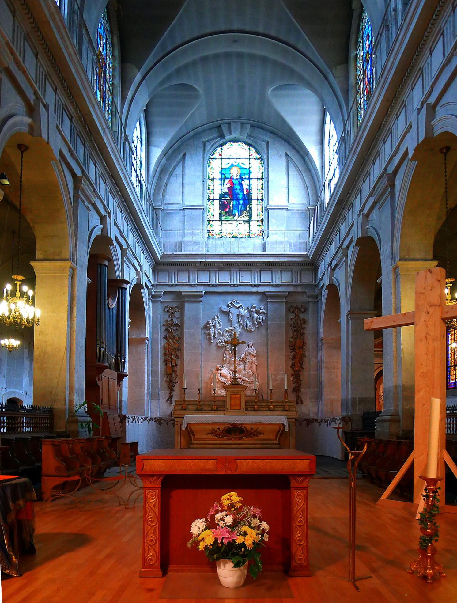 Église Sainte-Marguerite (autel et choeur) - Paris XI